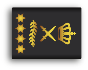 Rangen van de Nederlandse politie, epauletten (schuifpassanten) t.b.v. het huidige en het nieuwe (na 2014) uniform.